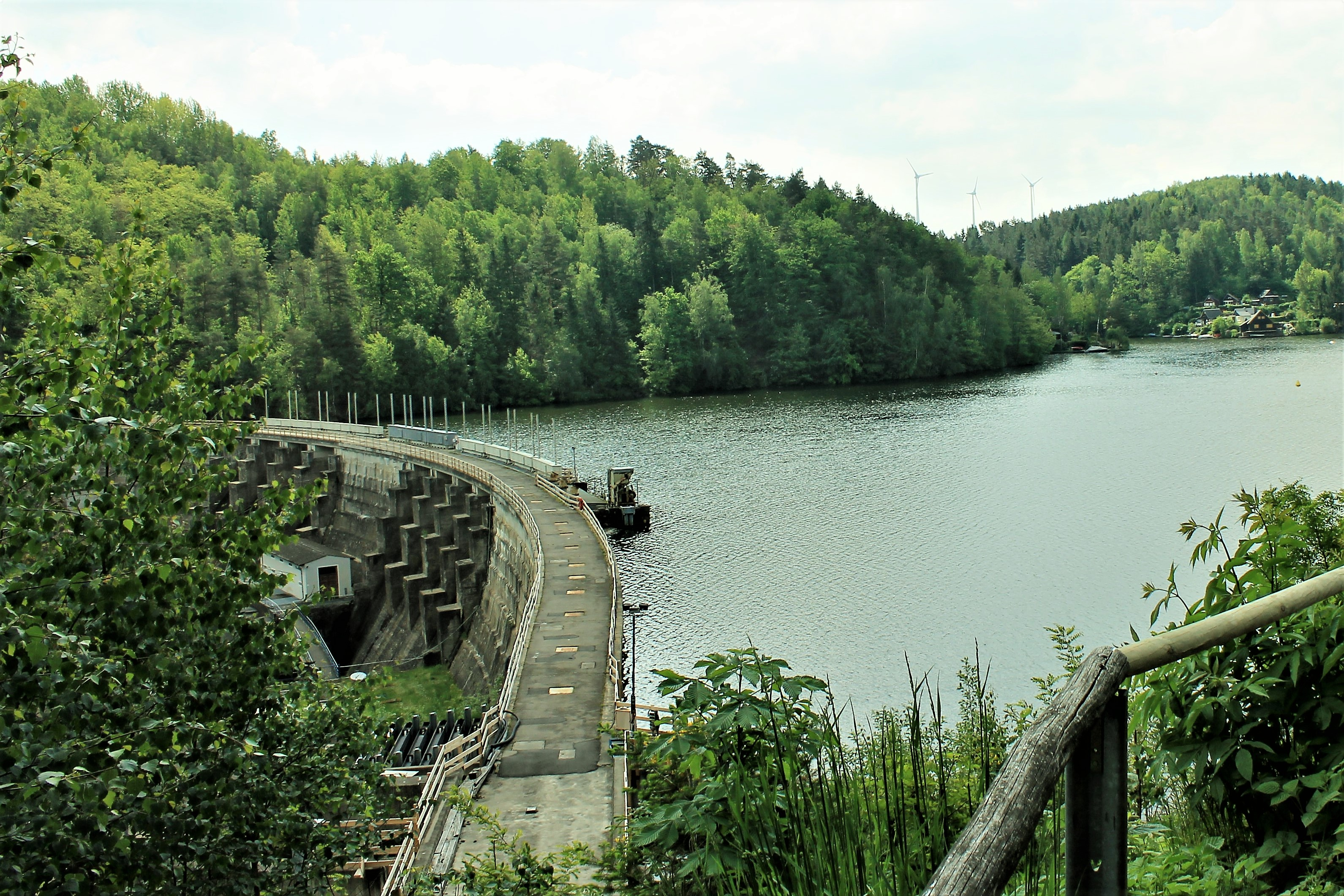 Landschaftsschutzgebiet Talsperre Kriebstein (1) Staumauer (1)